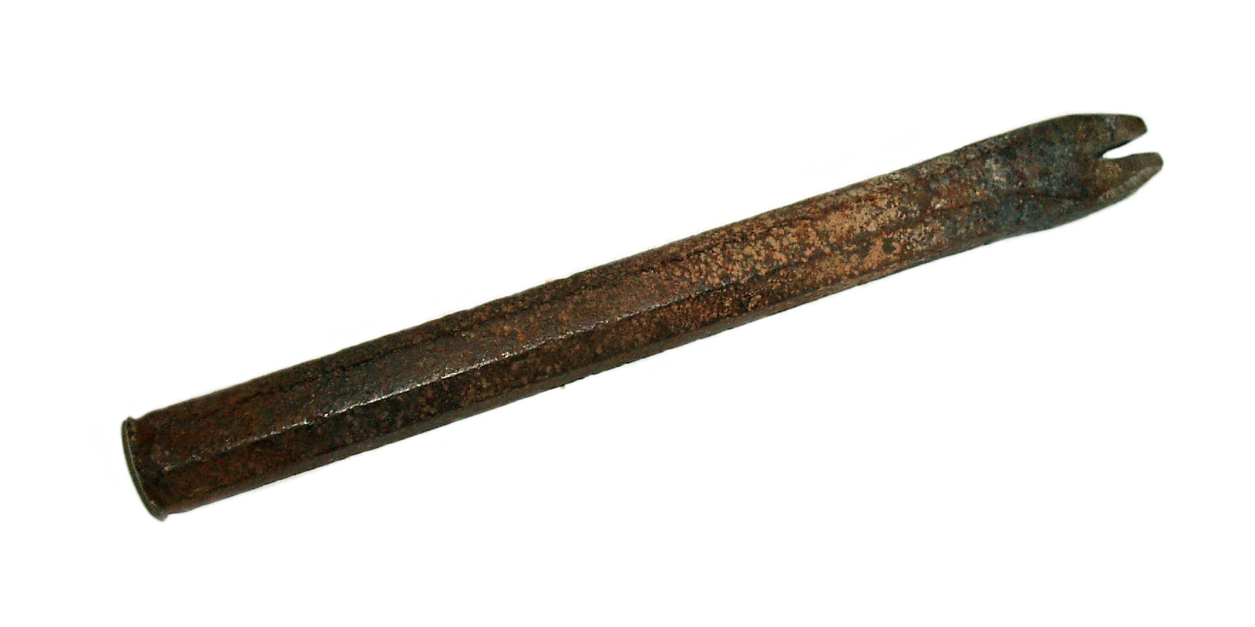 Kamenické dláto dvojzubák (cvejspitz)